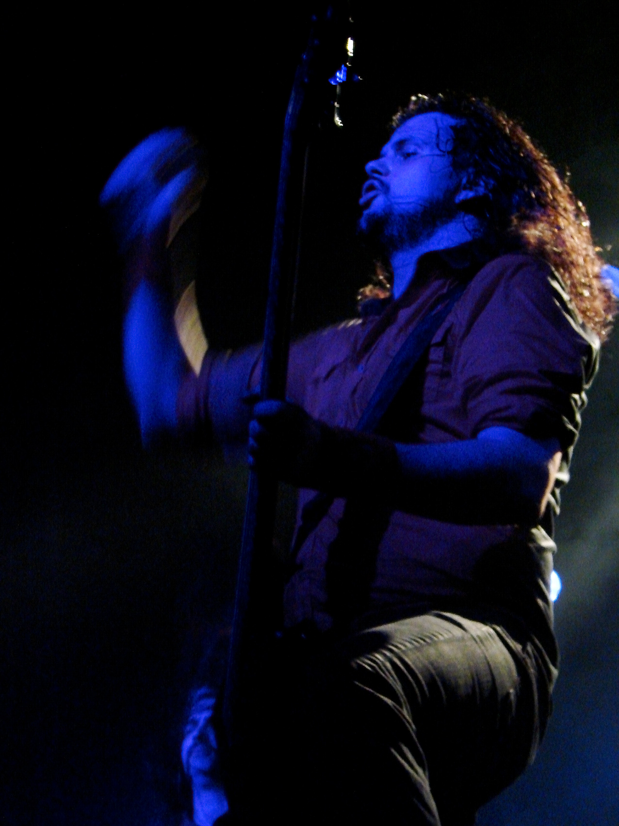 Vreid en concert à l'Elysée-Monmartre, Paris, le 2/12/2007. Hvall à la basse.